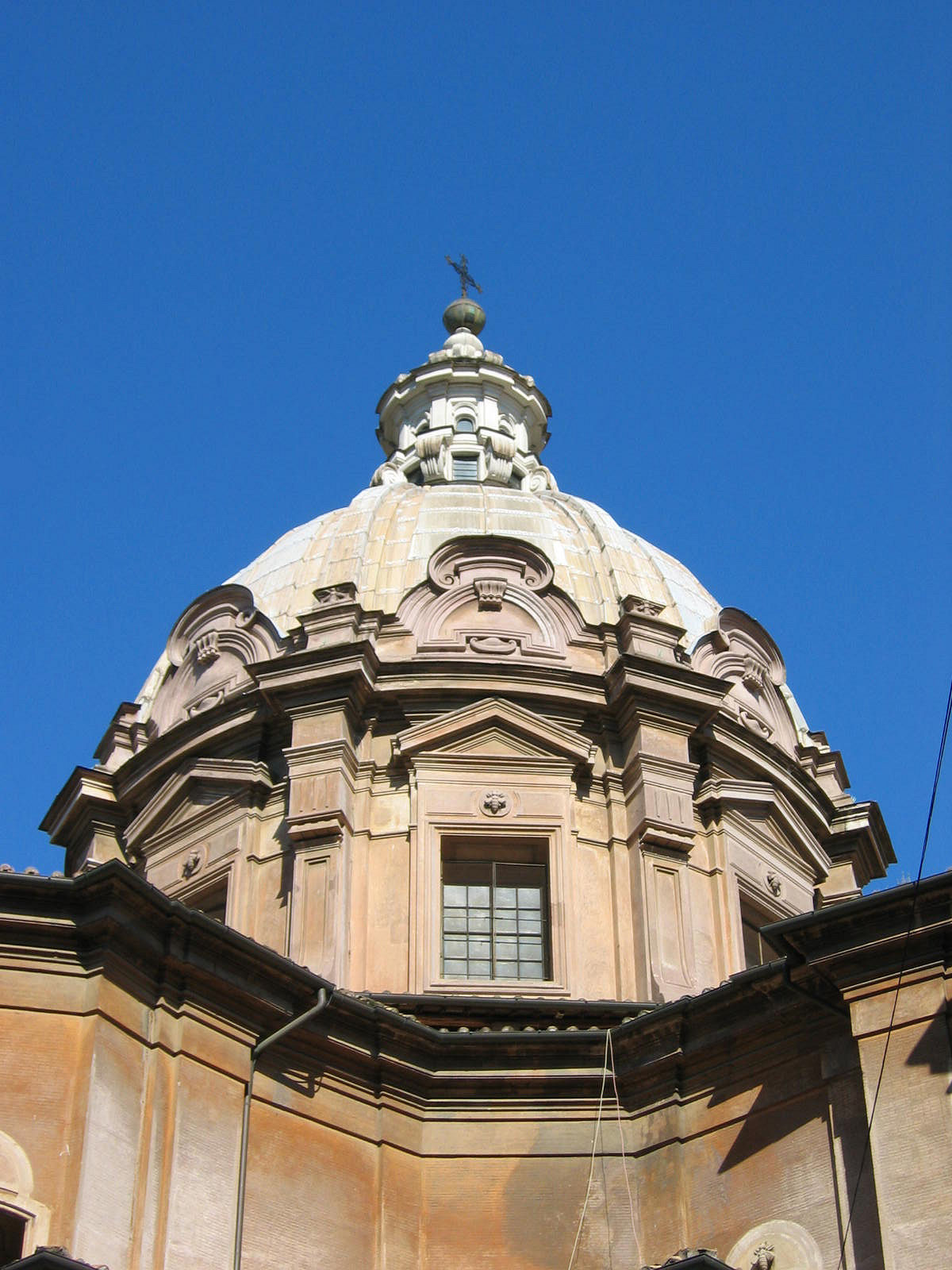 Chiesa dei Santi Luca e Martina, Roma. Cupola di Pietro da Cortona. Picture by Torvindus.